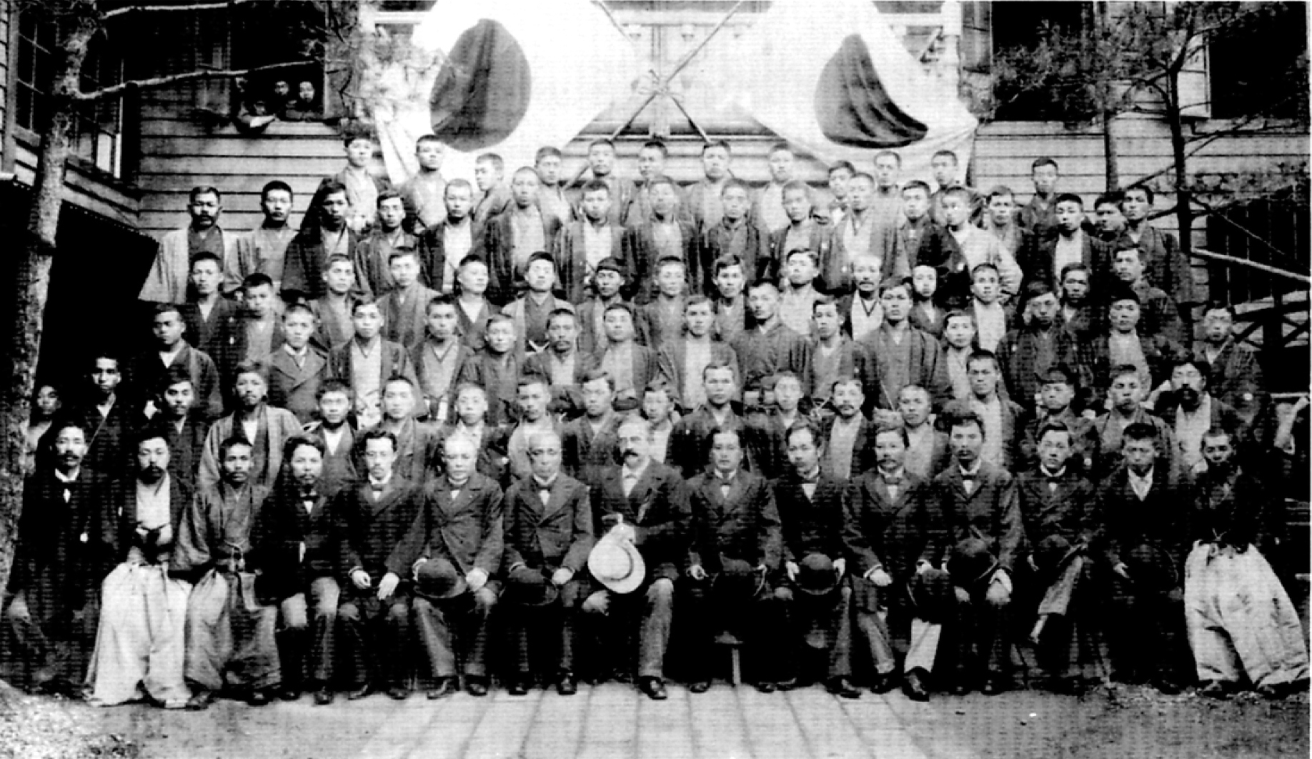 1901年の明治大学卒業記念写真